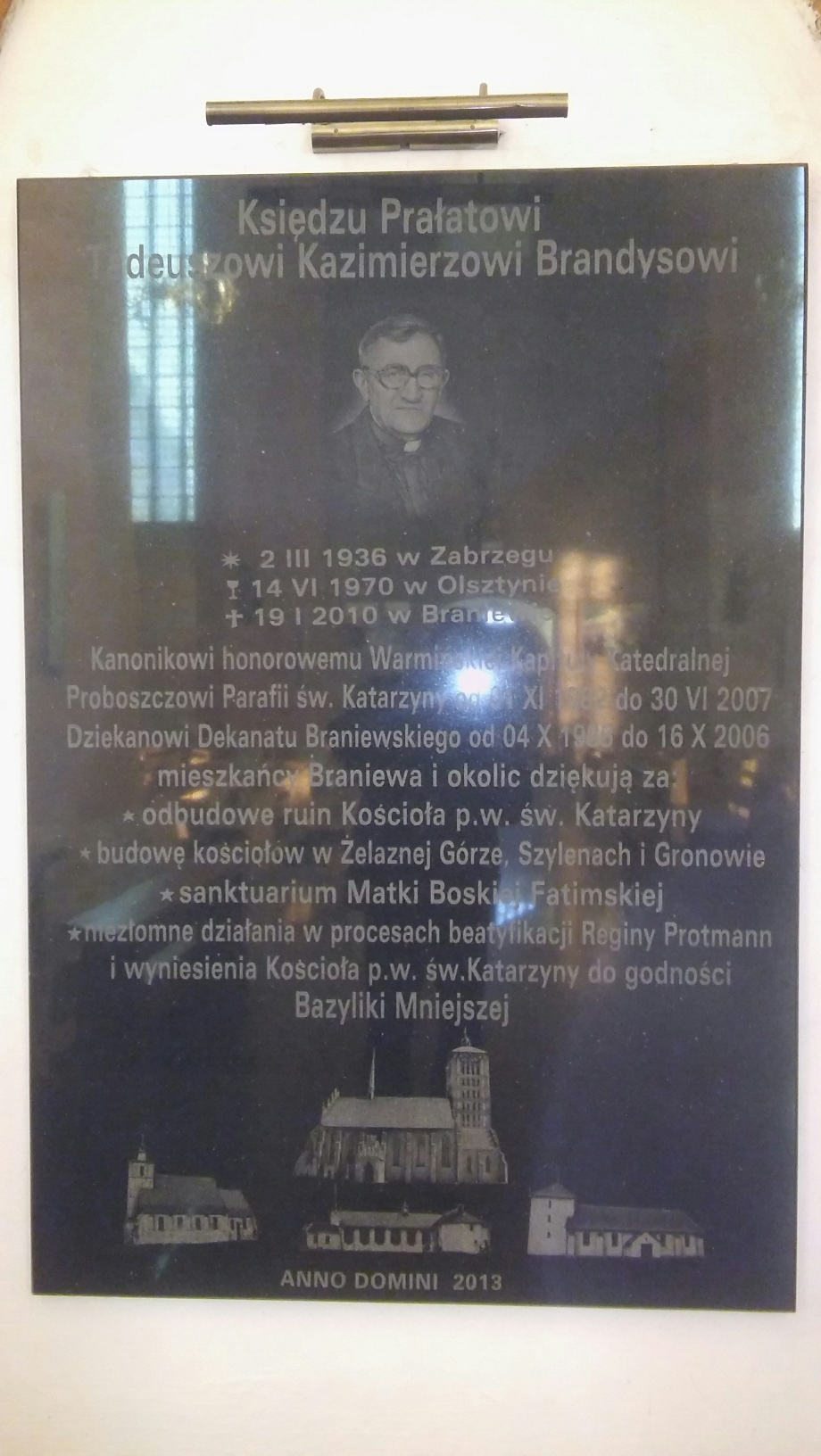 Tadeusz Brandys tablica pamiątkowa